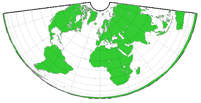 Darstellung der Erdoberfläche in der Albers-Kegelprojektion